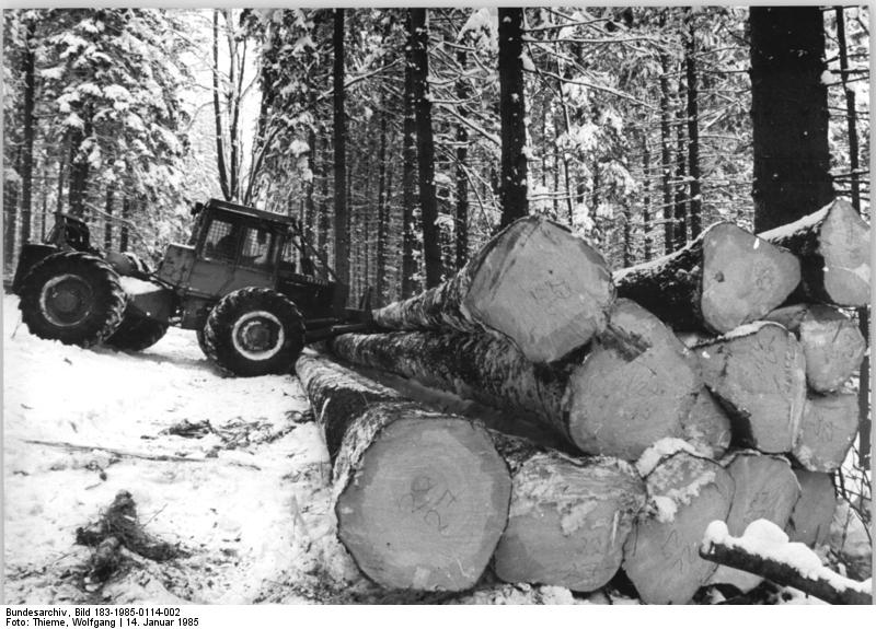 Marienberg, Räumen von Holz ADN-ZB Thieme 14.1.1985 Bez. Karl-Marx-Stadt: Jugend- Die sieben Jugendbrigaden des Staatlichen Forstwirtschaftsbetriebes Marienberg haben sich im Ernst-Thälmann-Aufgebot der FDJ verpflichtet, in diesem Jahr 1 500 Kubikmeter Schadholz über den Plan aufzuarbeiten und zusätzlich 300 Hektar Wald zu pflegen und aufzuforsten. Hier wird Langholz gerückt. - siehe auch 1985-0114-1 und 3N